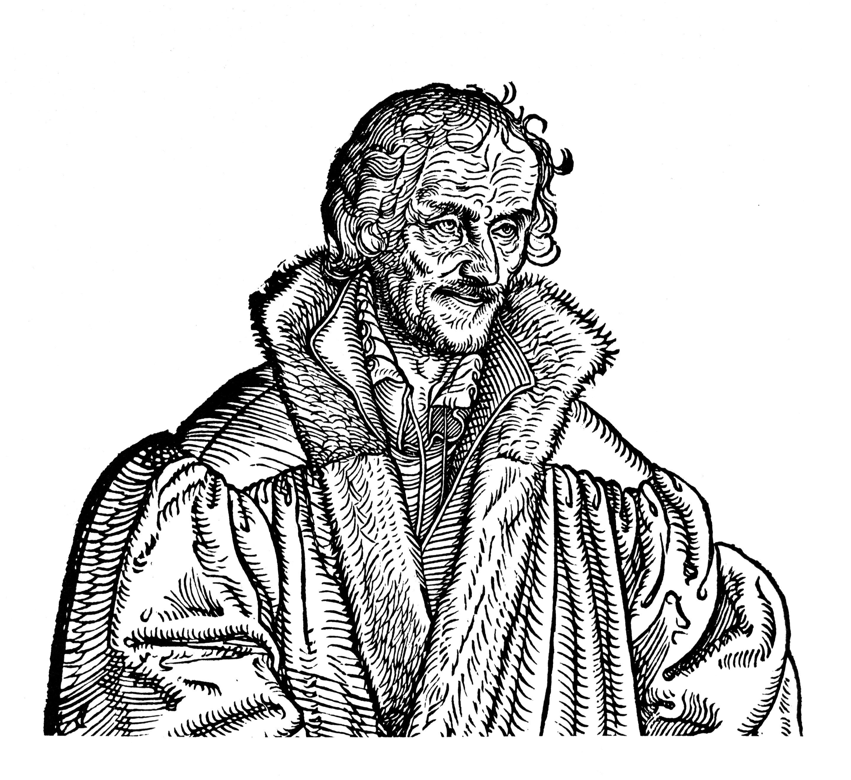 Holzschnitt Philipp Melanchthon von L. Cranach d. J.